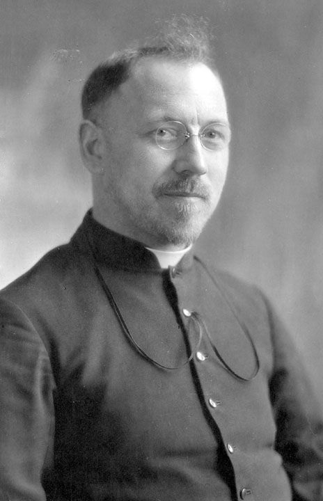 Le frère Adrien Rivard, vers 1933